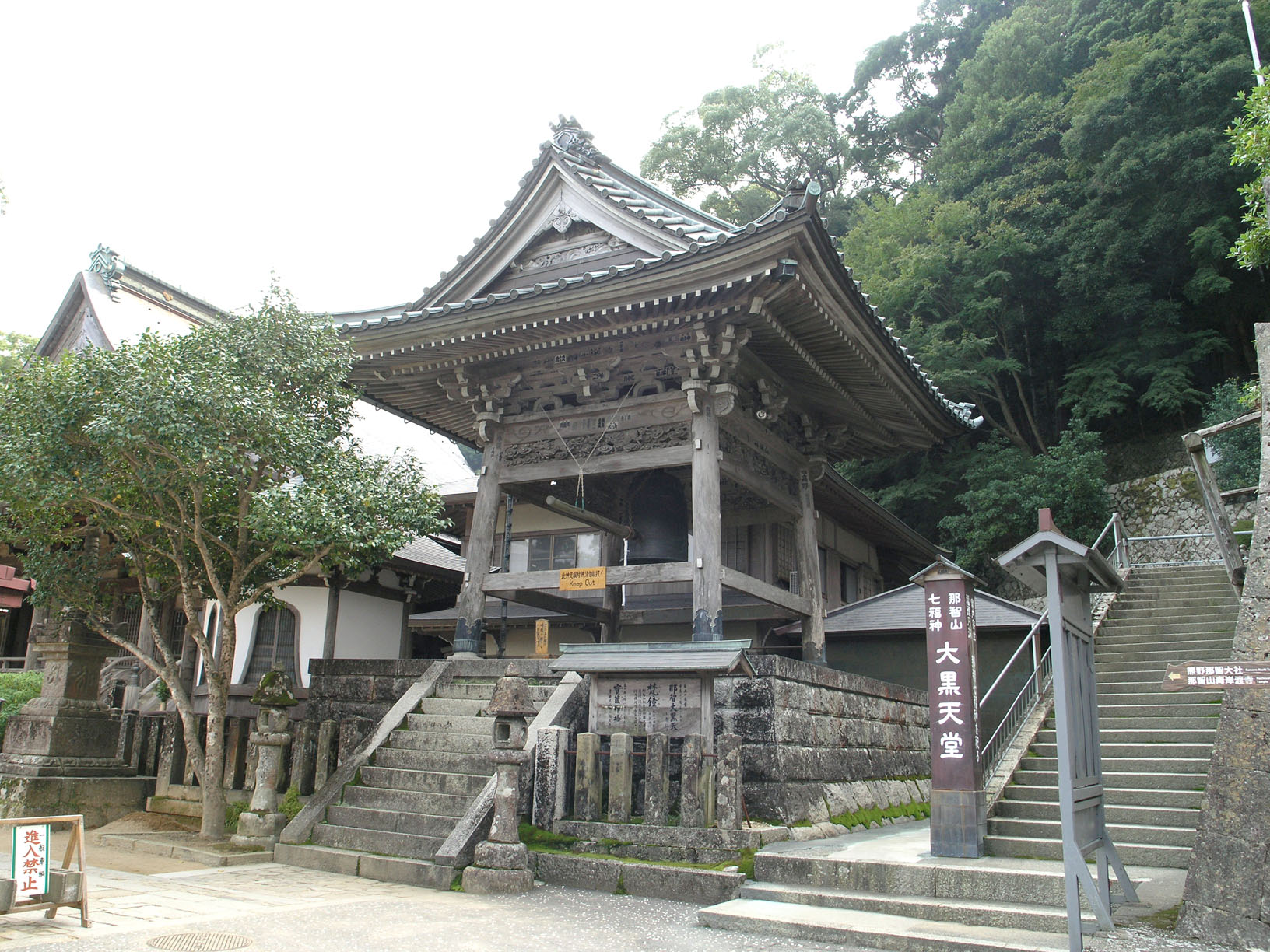 那智山青岸渡寺 (和歌山県東牟婁郡那智勝浦町) 2008年10月撮影。 機材：C8080WZ 撮影者：Kansai explorer